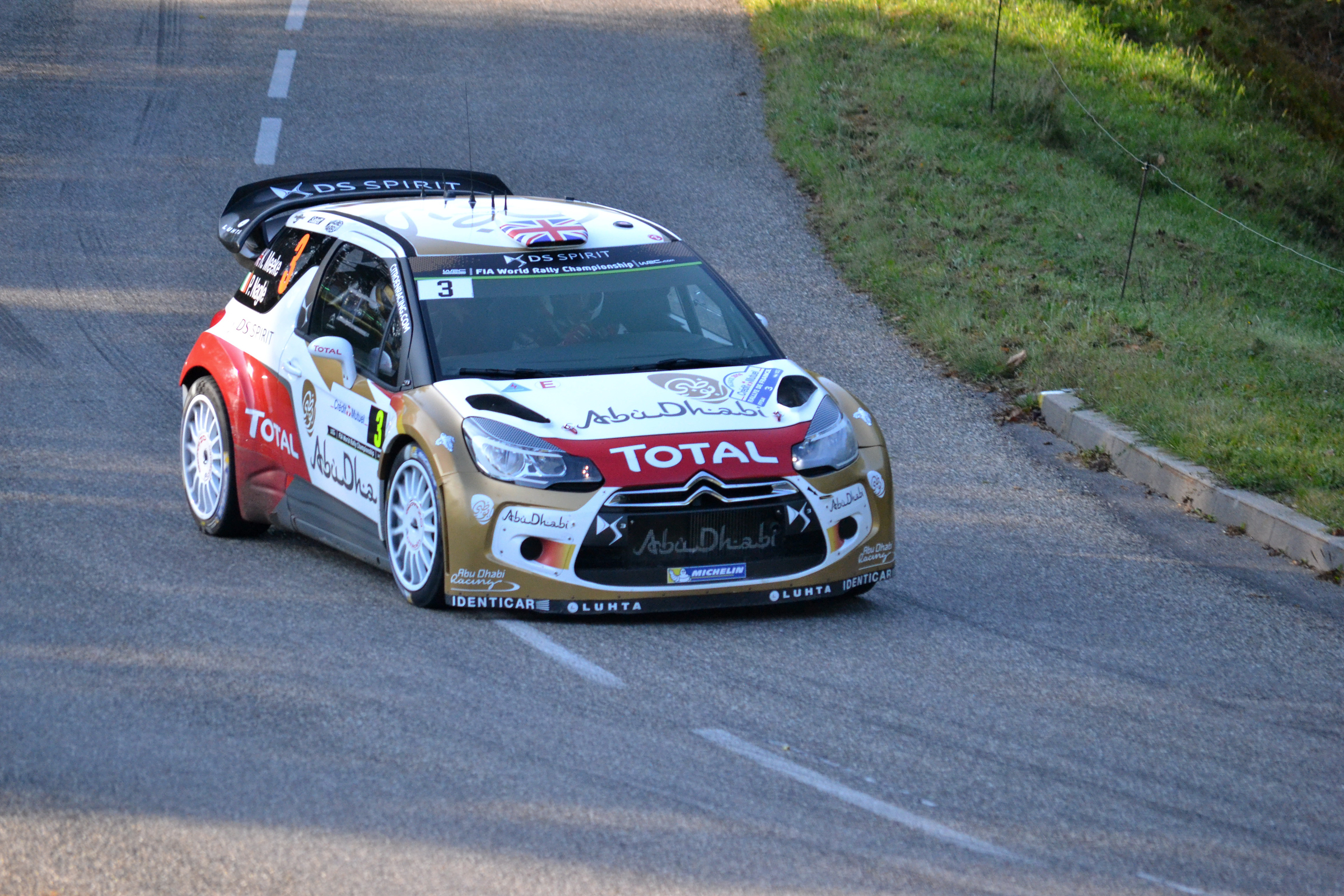 Rallye WRC France-Alsace 2014, ES9 Soultzeren - Le Grand Hohnack 1 à Labaroche. Citroên DS3 WRC - Kris Meeke - Paul Nagel